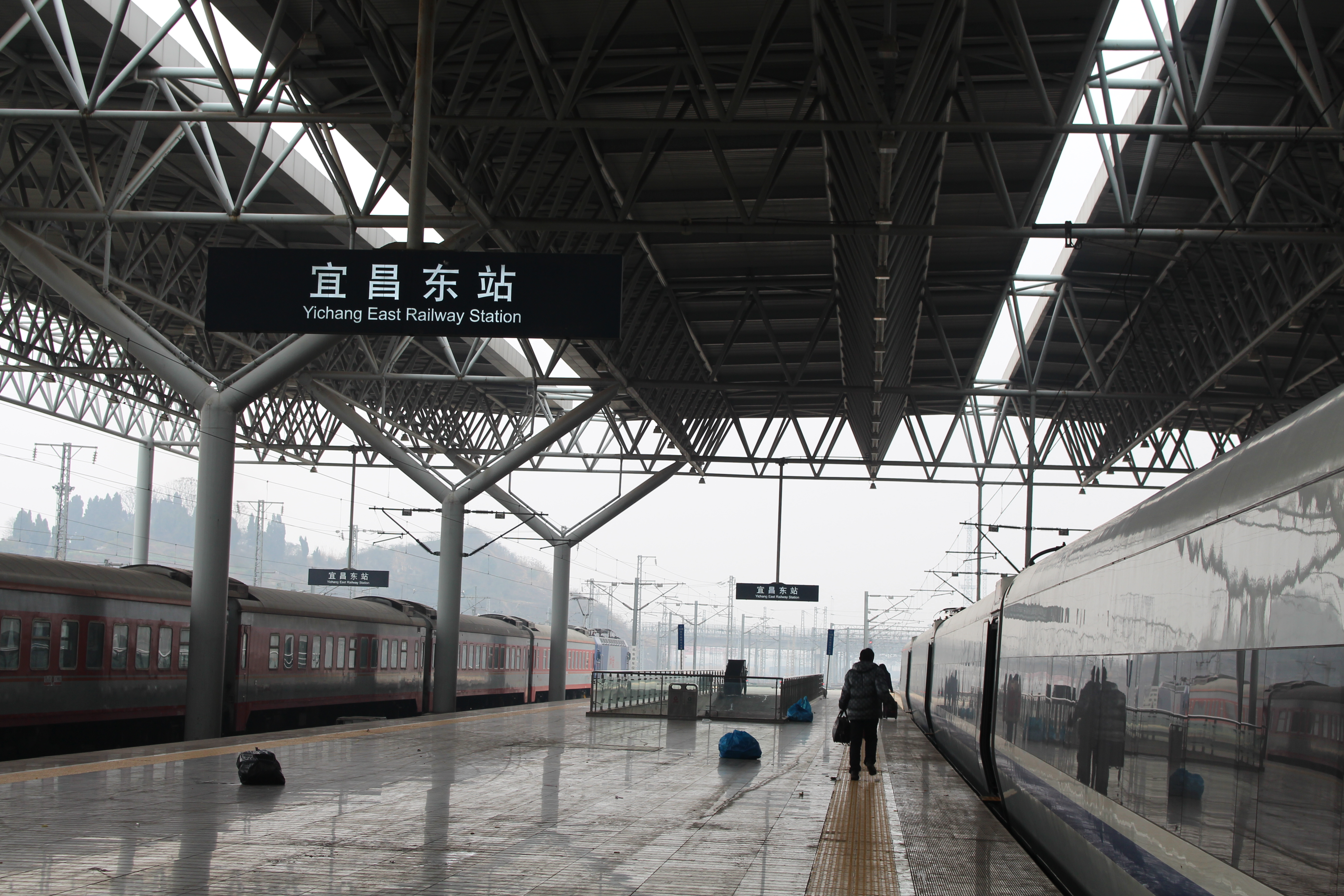 中文（中国大陆）: 摄于2015年2月2日，宜昌东站月台，右为D354次列车